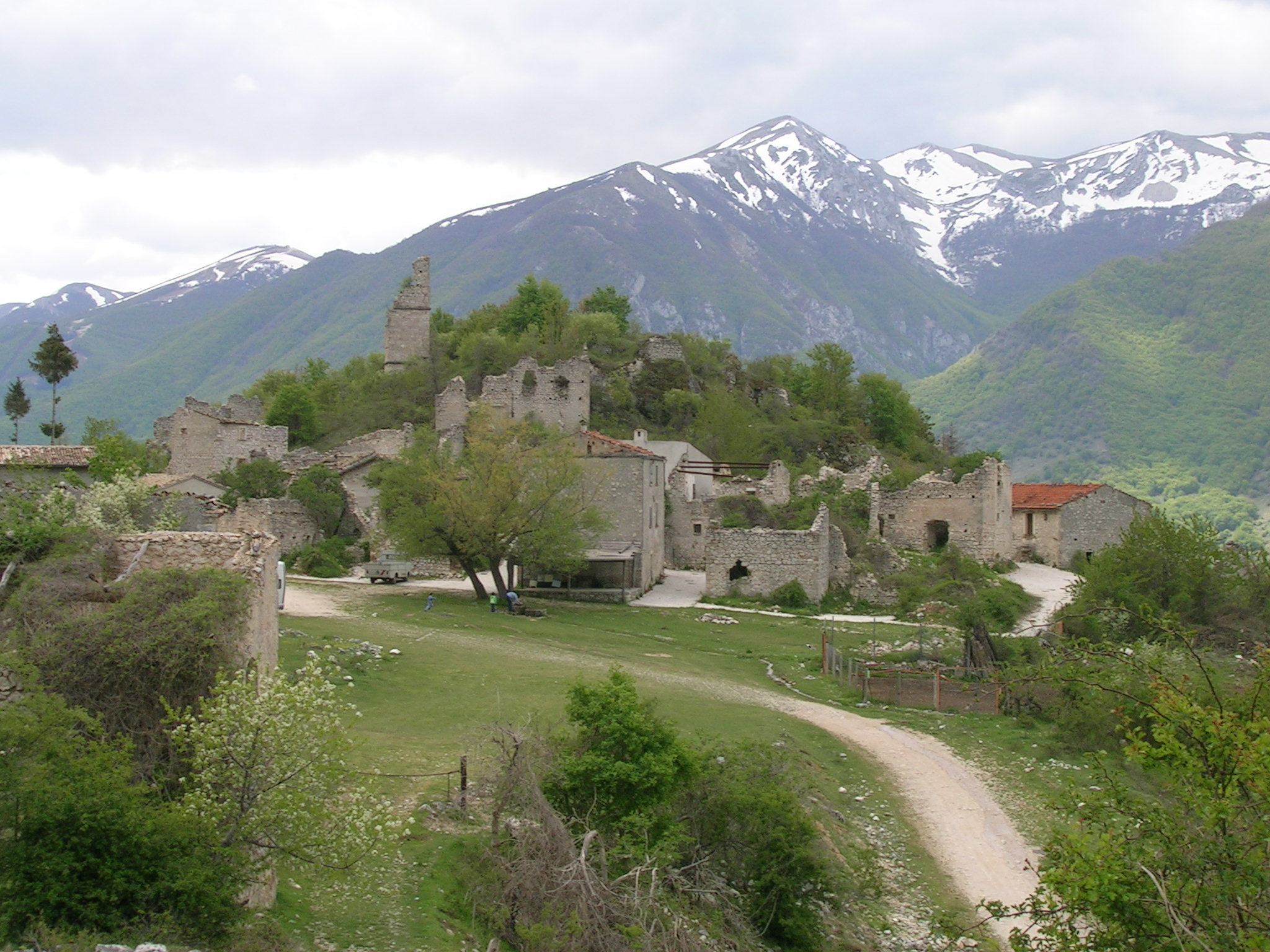 L'abitato di Frattura Vecchia completamente distrutto nel 1915, situato su una faglia del Monte Genzana. Rovine di Frattura Vecchia.